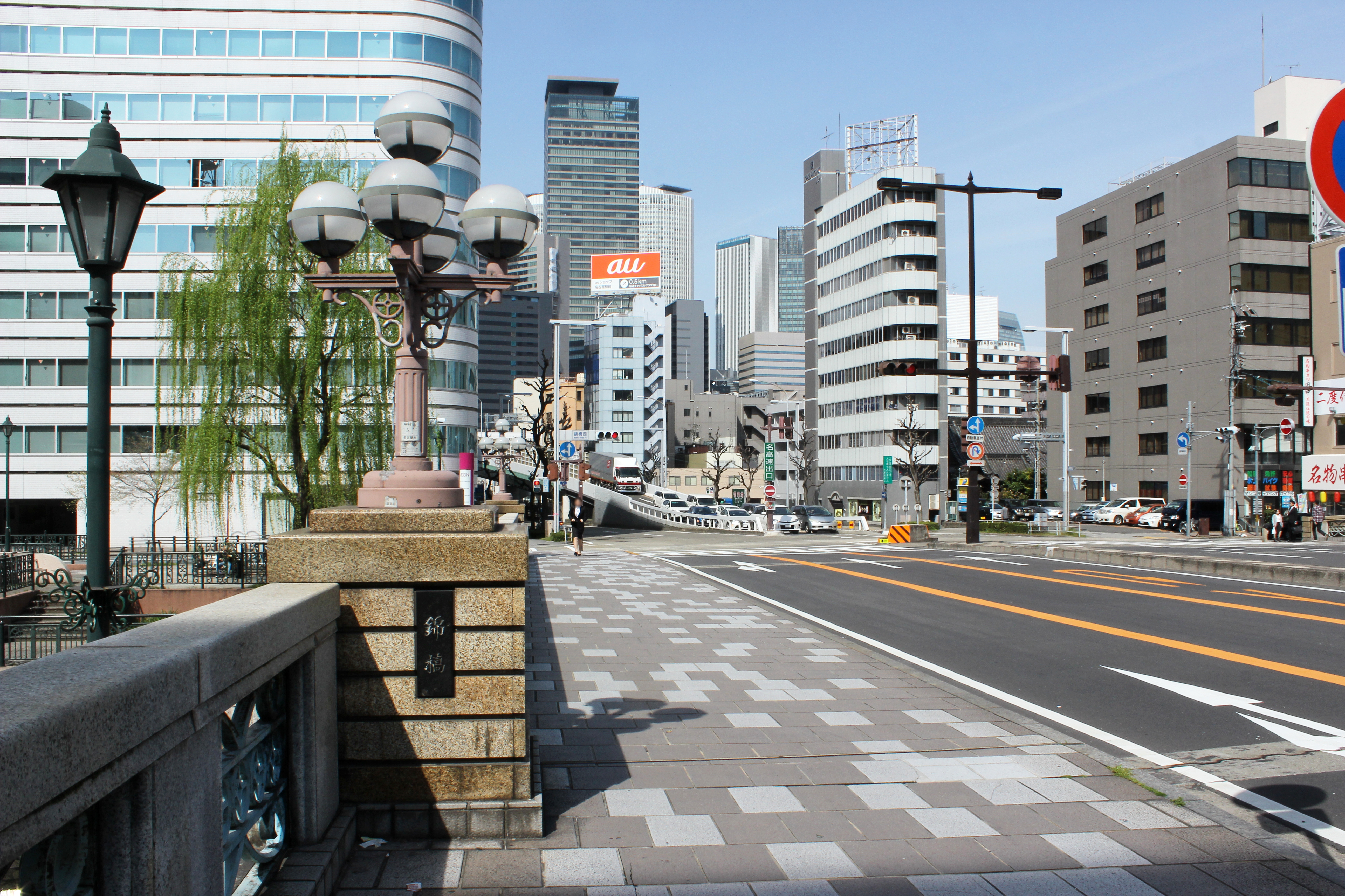 堀川に架かる錦橋（名古屋市中区）